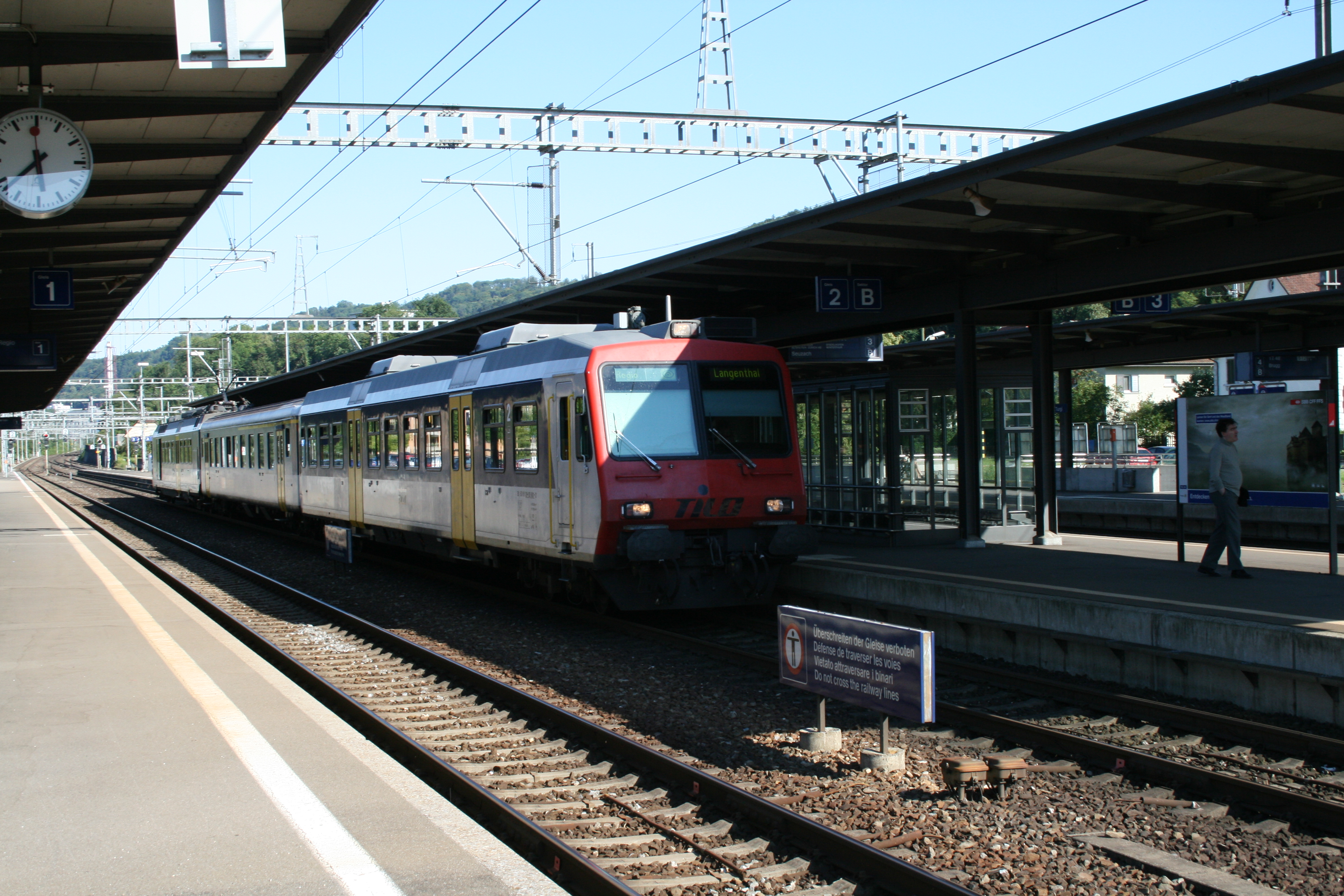 Bahnhof Turgi, Schweiz